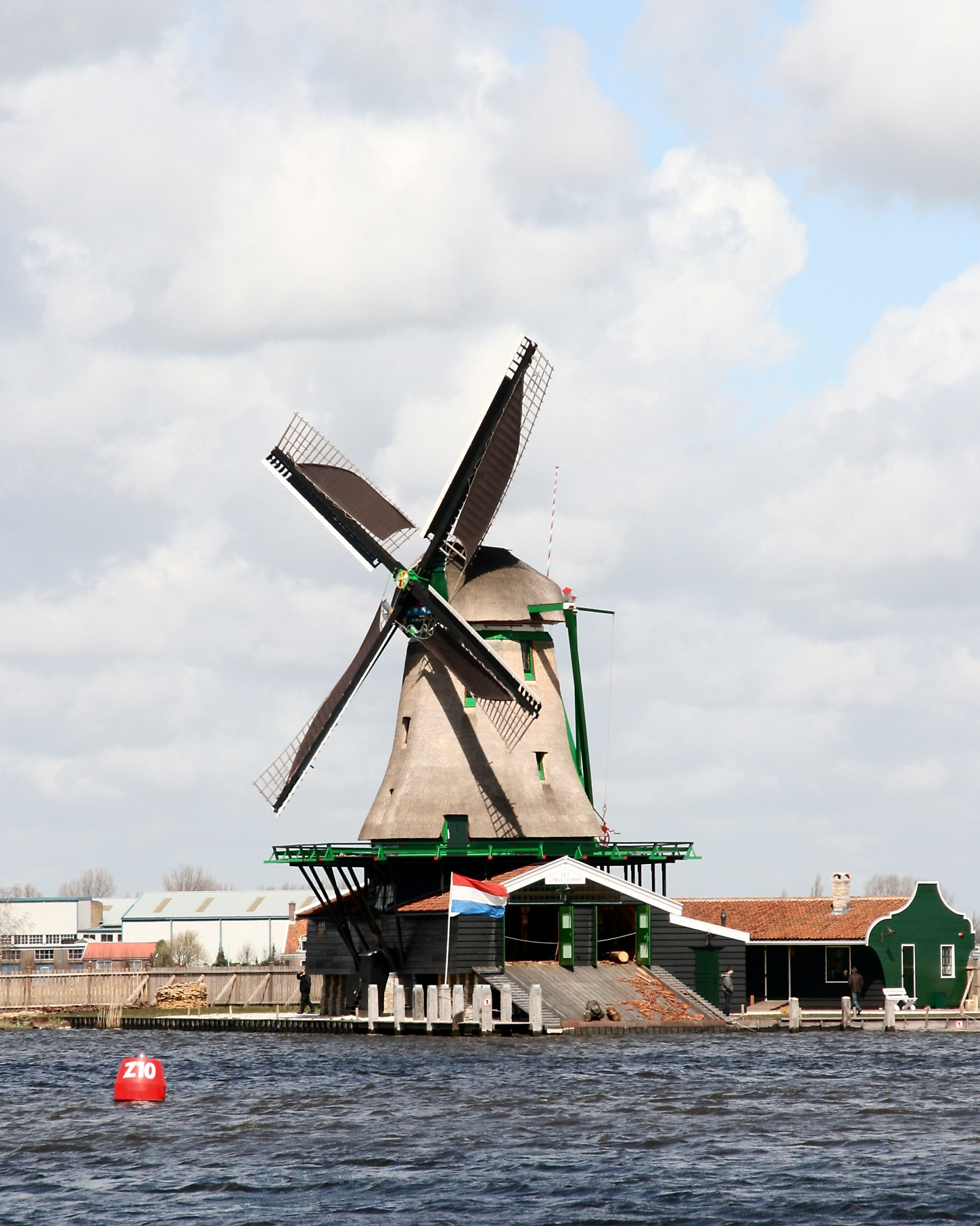 Zaanse Schans: Houtzaagmolen Het Jonge Schaap met zeilen